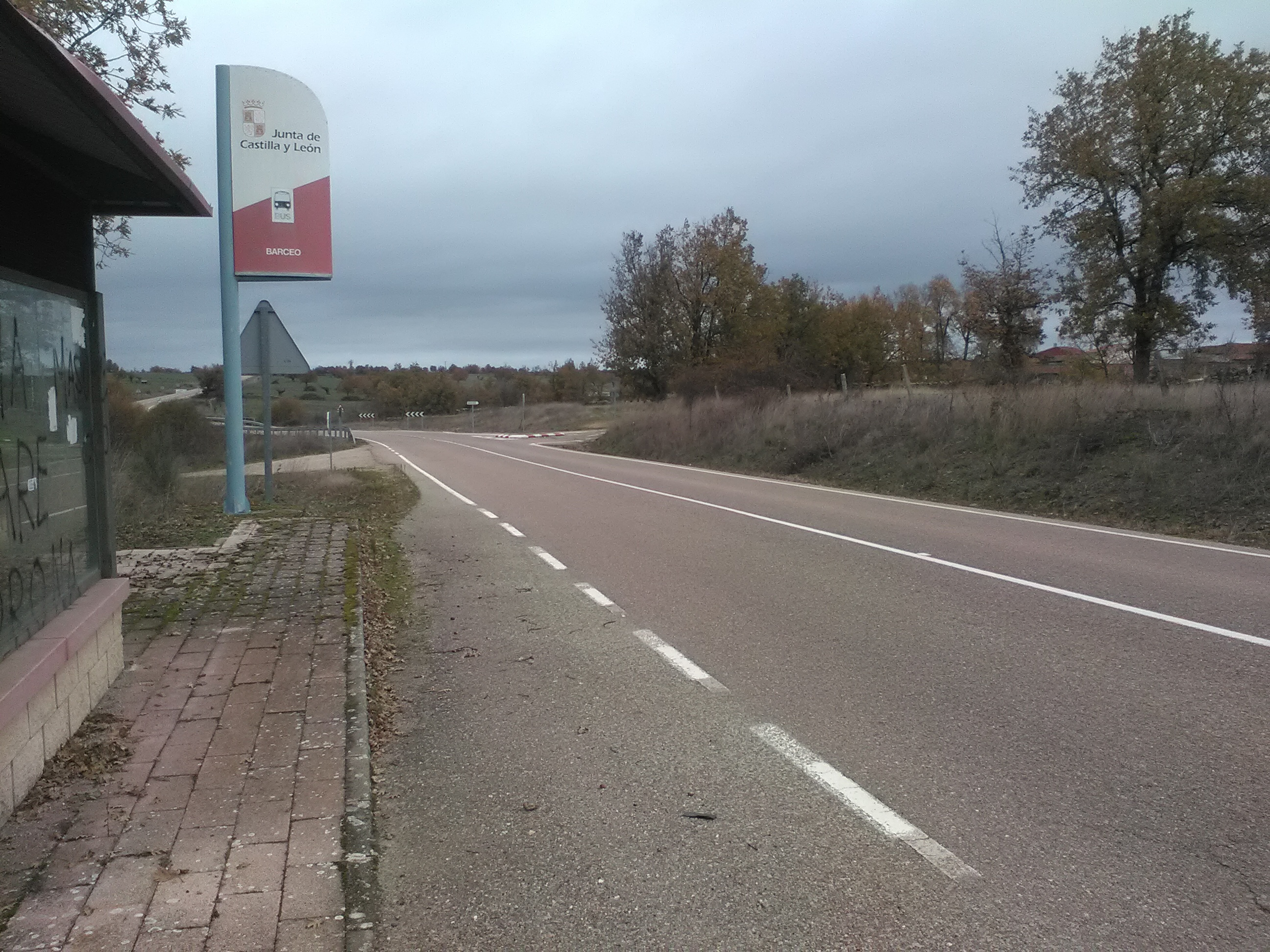 Carretera Comarcal SA- 314en Barceo (Salamanca).